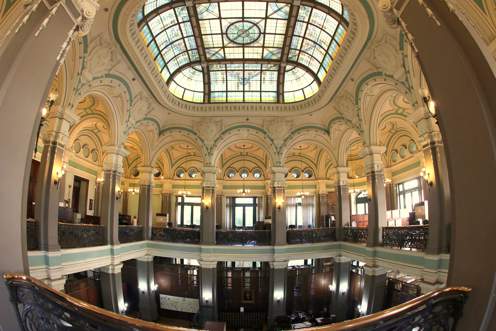 O ministro da Cultura, Sérgio Sá Leitão, e a presidente da Fundação Biblioteca Nacional (FBN), Helena Severo, participam, na noite desta terça-feira (11), no Rio de Janeiro, da cerimônia de abertura da exposição 1808 – 1818: A construção do reino do Brasil. Trata-se de uma das ações do programa de celebração dos 200 Anos da Independência do Brasil, iniciadas neste ano pelo Ministério da Cultura (MinC). A Pasta tem dado especial atenção ao tema, articulando e incentivando iniciativas que culminarão em 7 de setembro de 2022. O MinC lidera um comitê interministerial acerca do assunto. "Além desta exposição que abre hoje, as ações que já realizamos incluem um edital de audiovisual, para desenvolvimento de projetos de séries e longas, e outro para produção e publicação de obras literárias. Vale lembrar que José Bonifácio de Andrada e Silva foi um dos homenageados na cerimônia da Ordem do Mérito Cultural de 2018. O Instituto Histórico e Geográfico Brasileiro, que completou recentemente 180 anos de existência, também recebeu a comenda", ressalta o ministro. 01/12/2018 FOTOS: Ronaldo Caldas/ASCOM/MinC